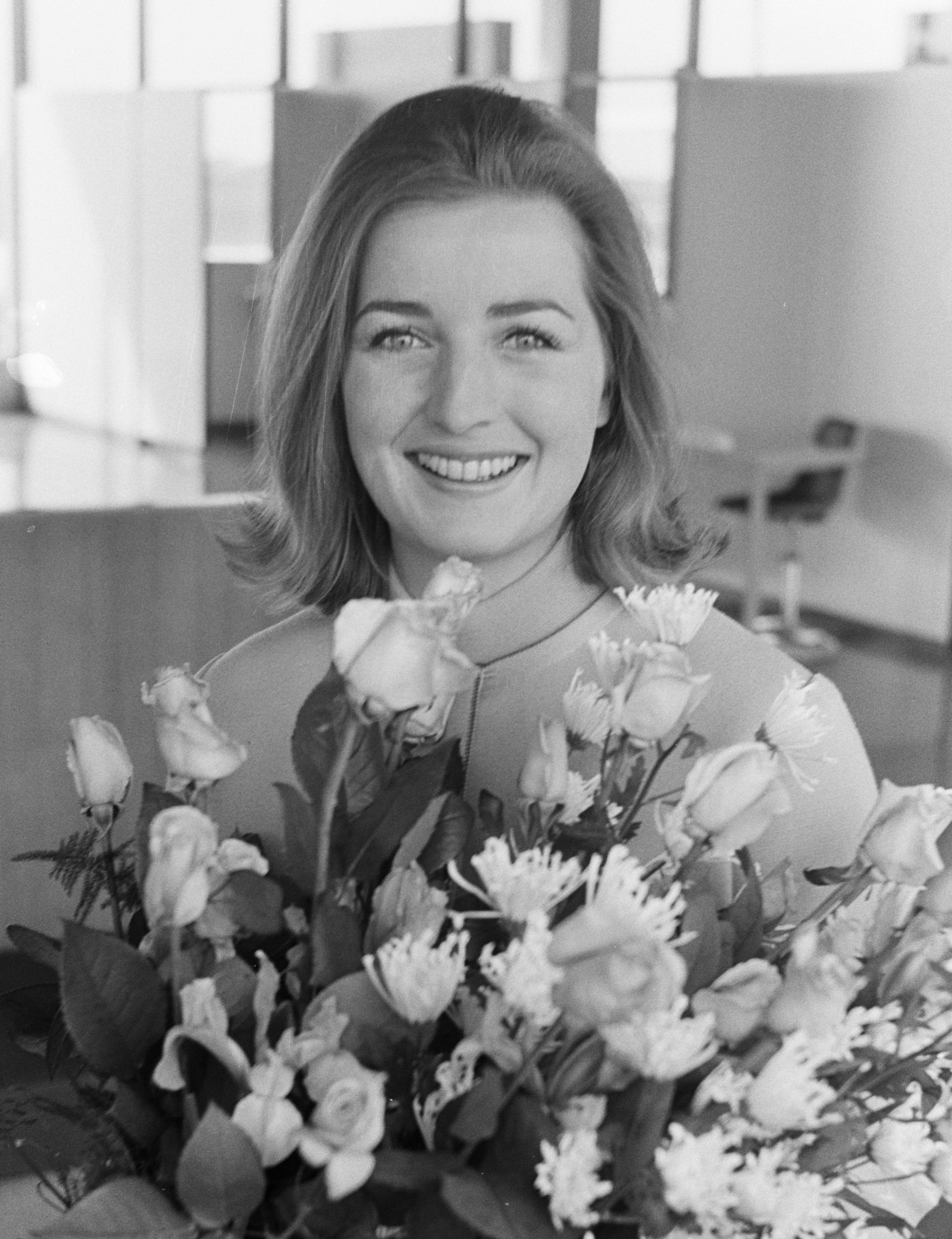 Aankomst Miss Australia 1969 20 jarige Suzanne McClelland , op Schiphol kop met bloemen